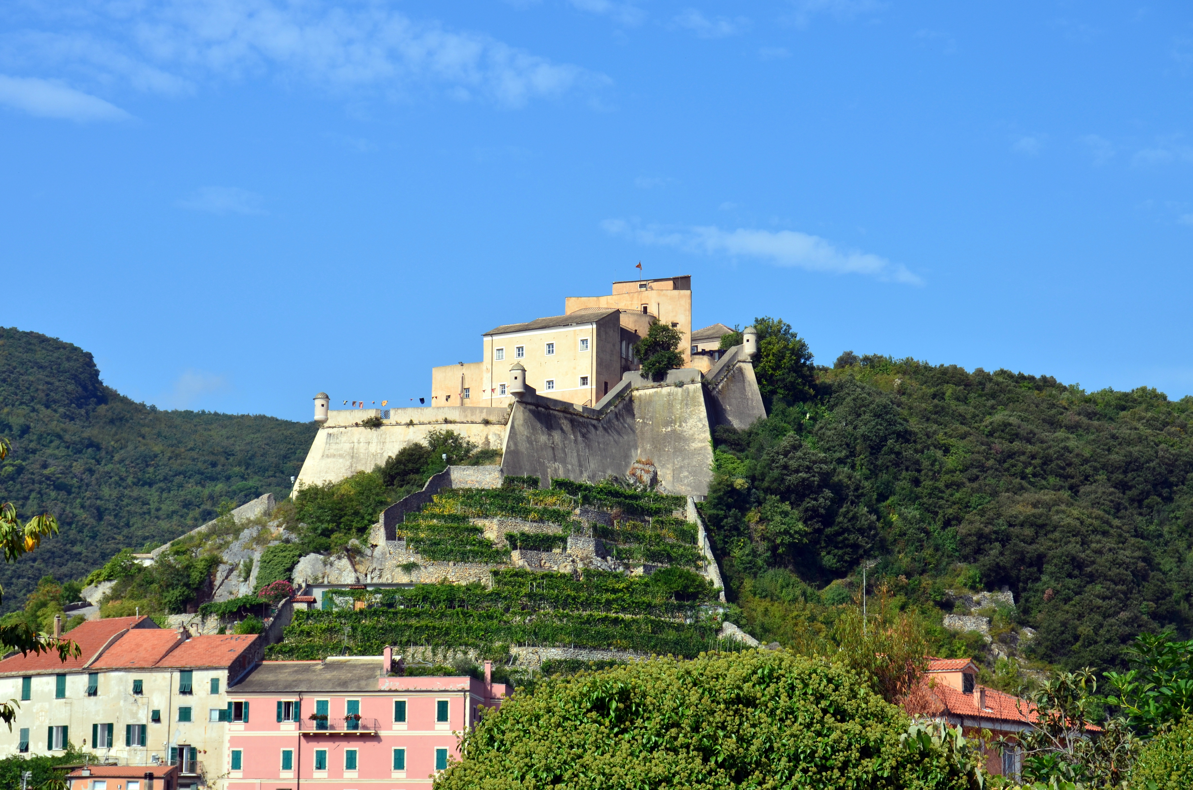 Il Castel San Giovanni, Finalborgo, Finale Ligure, Liguria, Italia